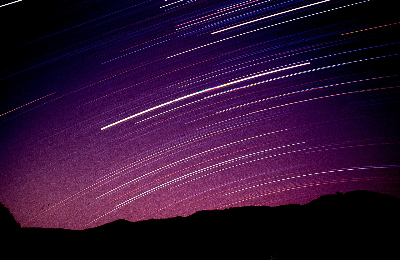 星の軌跡十津川・上湯にて